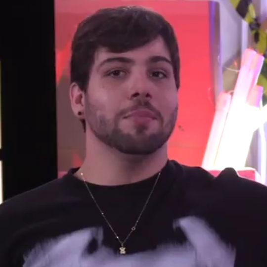 Youtuber Lucas Olioti em 2019